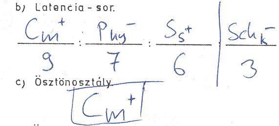 Szondi-teszt, saját tesztfelvétel, a vsz. engedélyével